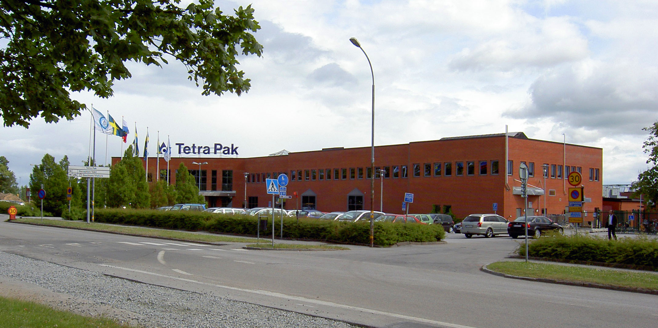 TetraPak, Lund